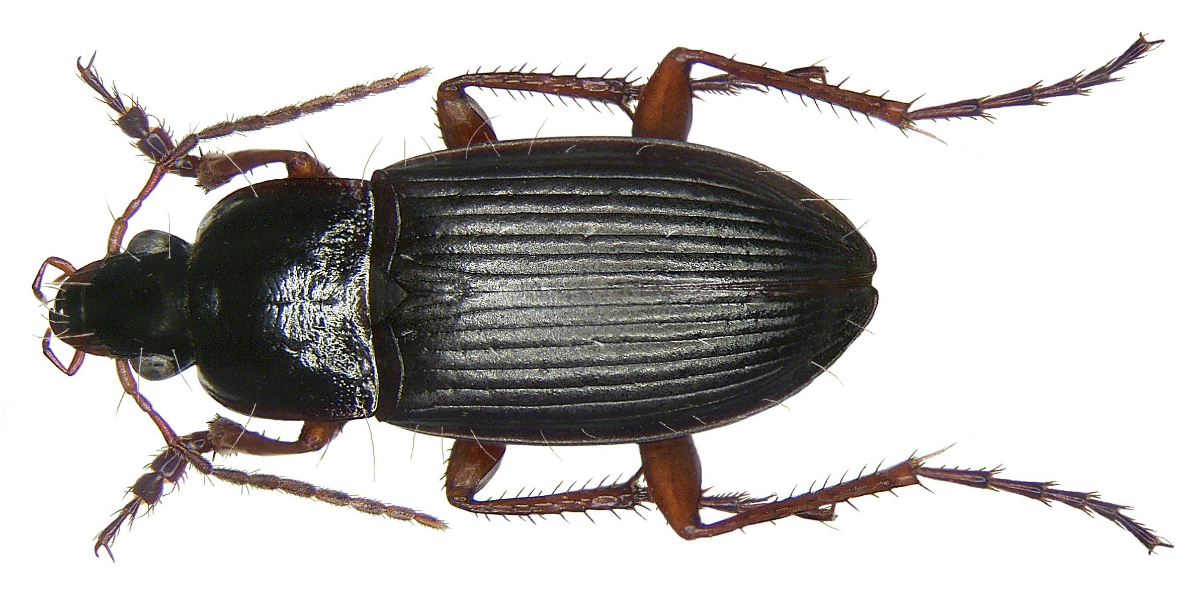 Familie: Carabidae Größe: 10-14,5 mm Verbreitung: von Nordafrika über ganz Europa bis Westasien Ökologie: in offenen und meist trockenen Lebensräumen Fundort: Germania, Oberfranken, Selbitz leg. det. U.Schmidt, 2005 Foto: U.Schmidt, 2008